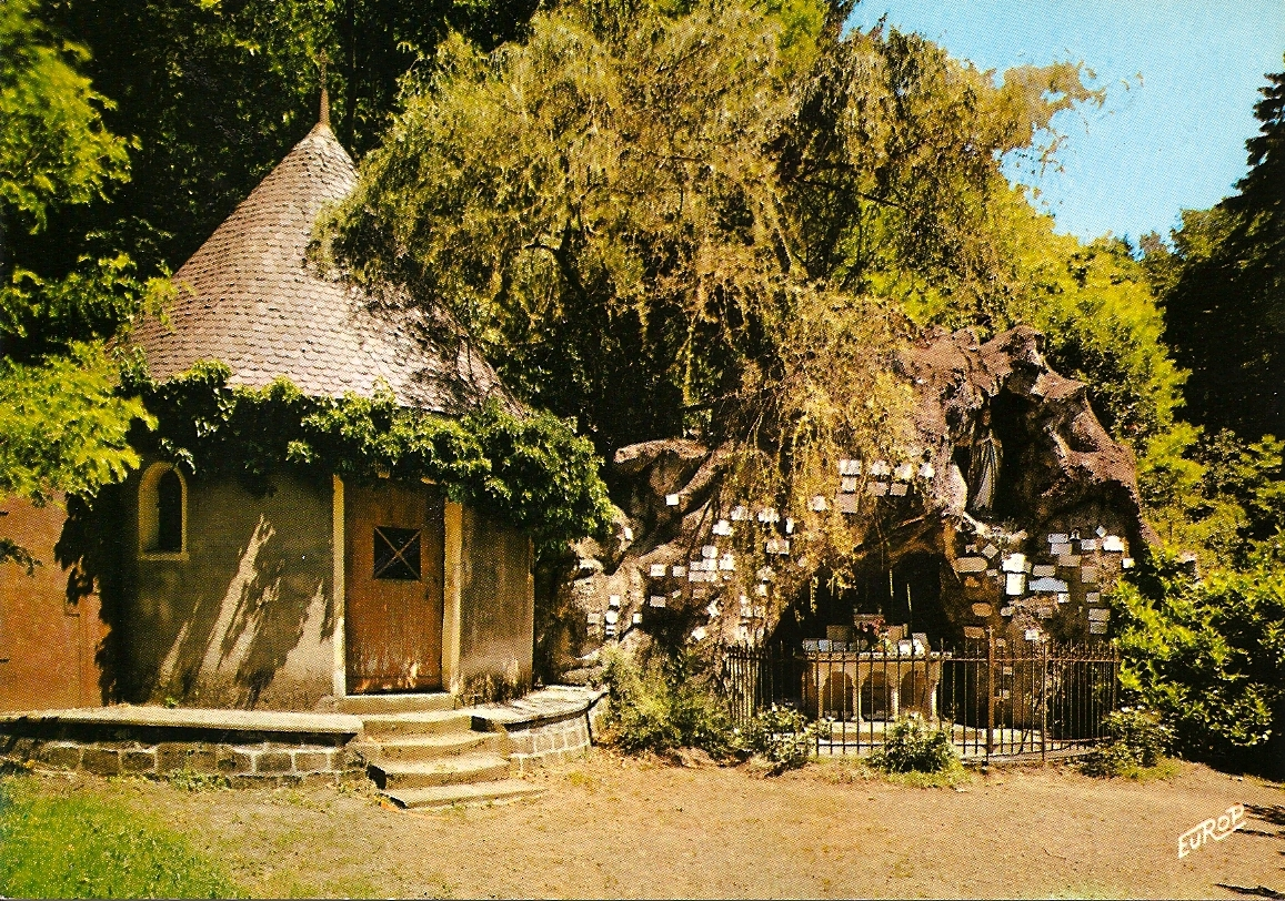 Grotte Sainte Marie de Raon-l'Étape (Vosges). Carte postale ancienne domaine public